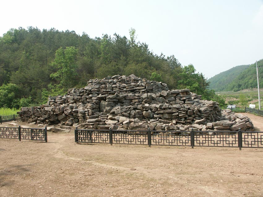 경상북도 유형문화재 제301호 의성석탑리방단형적석탑 (義城石塔里方壇形積石塔) - 전경